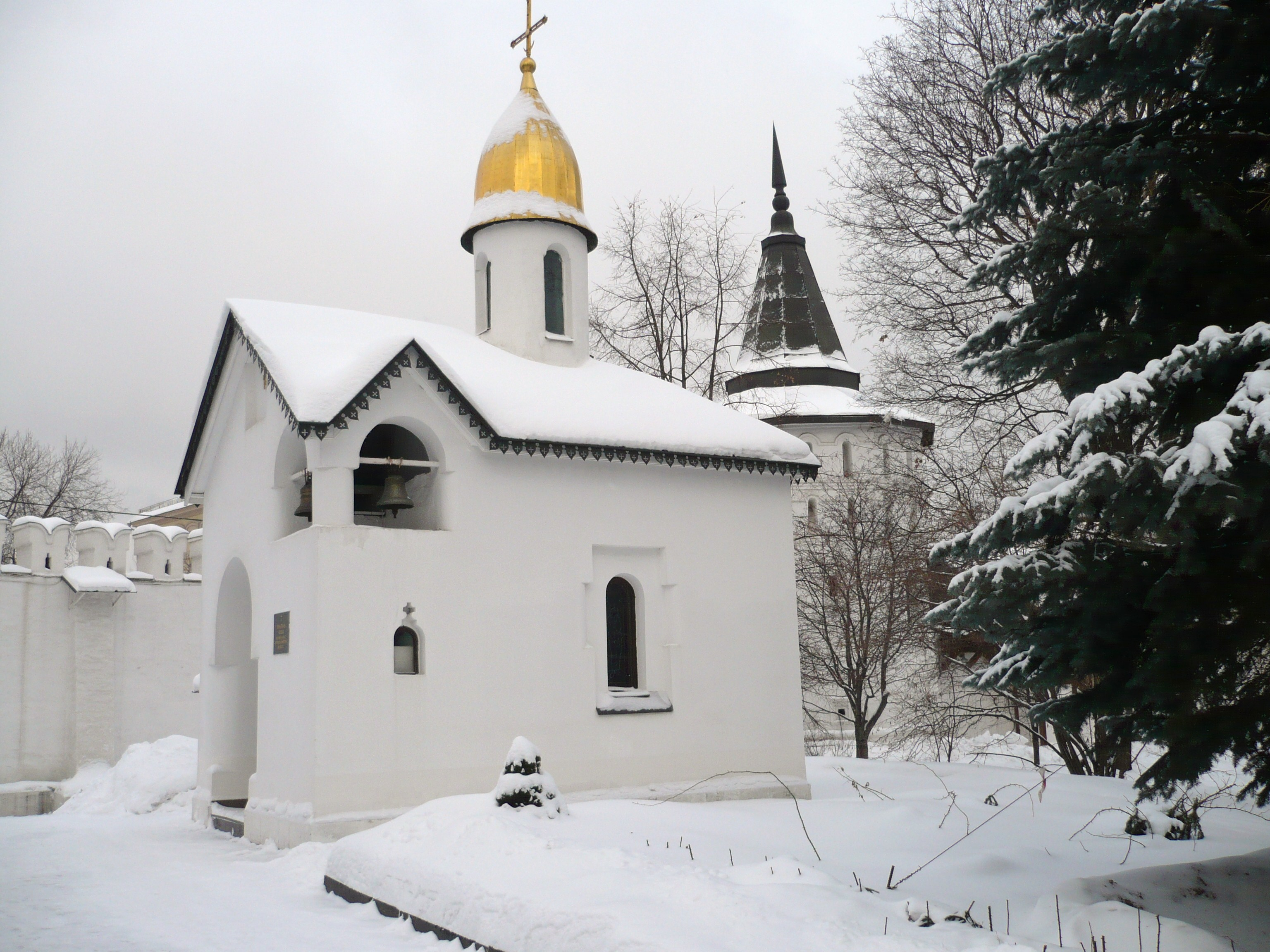 ПОМИНАЛЬНАЯ ЧАСОВНЯ (Данилов монастырь)